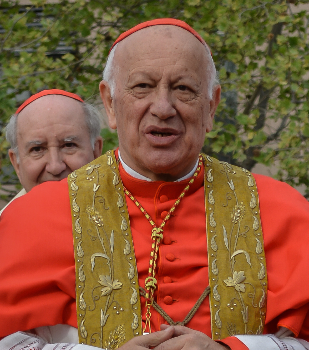 Ricardo Cardenal Ezzati Andrello. Procesión de la Virgen del Carmen 2017, Santiago, Chile